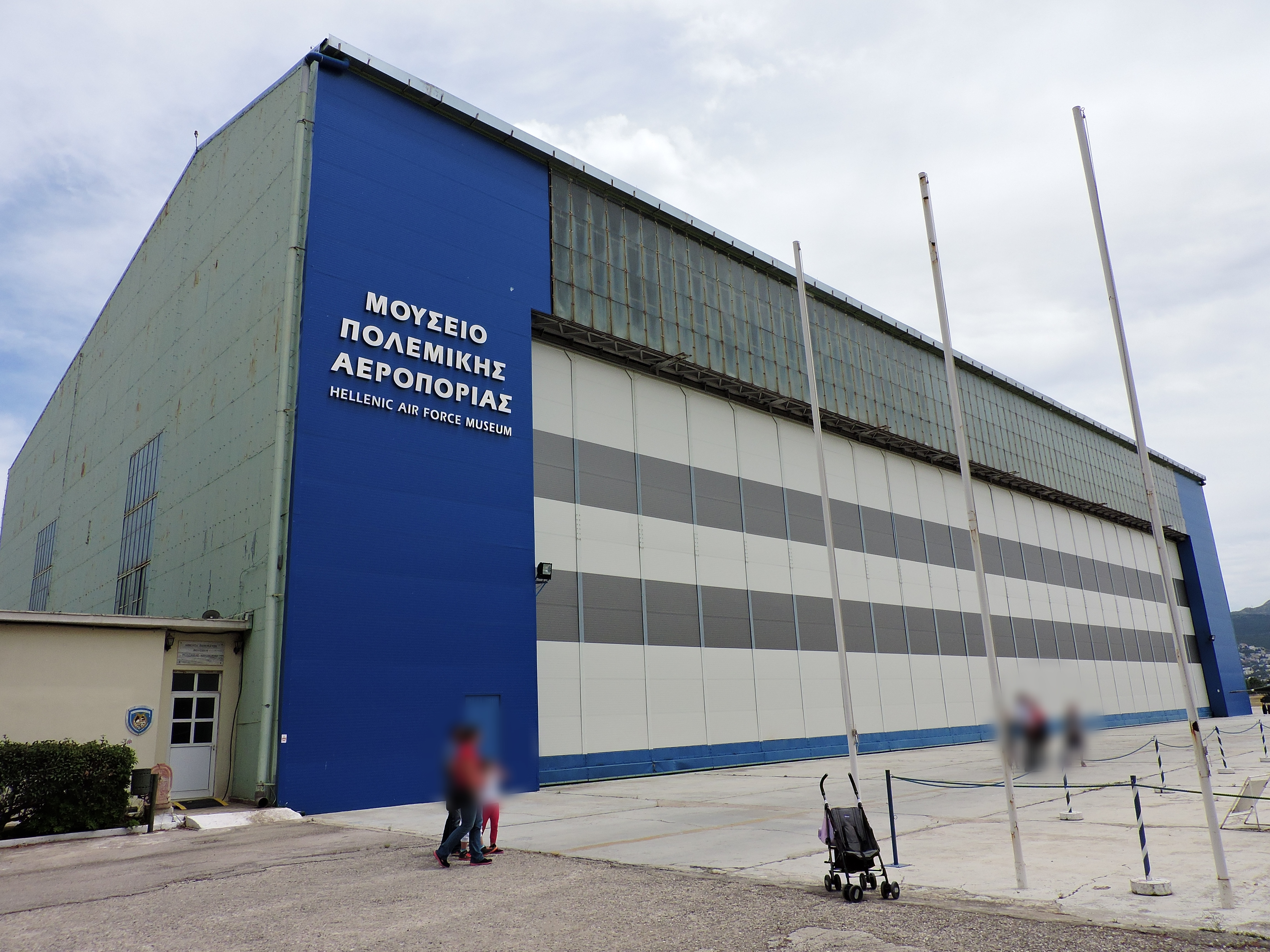 Hellenic Air Force Museum - Μουσείο Πολεμικής Αεροπορίας